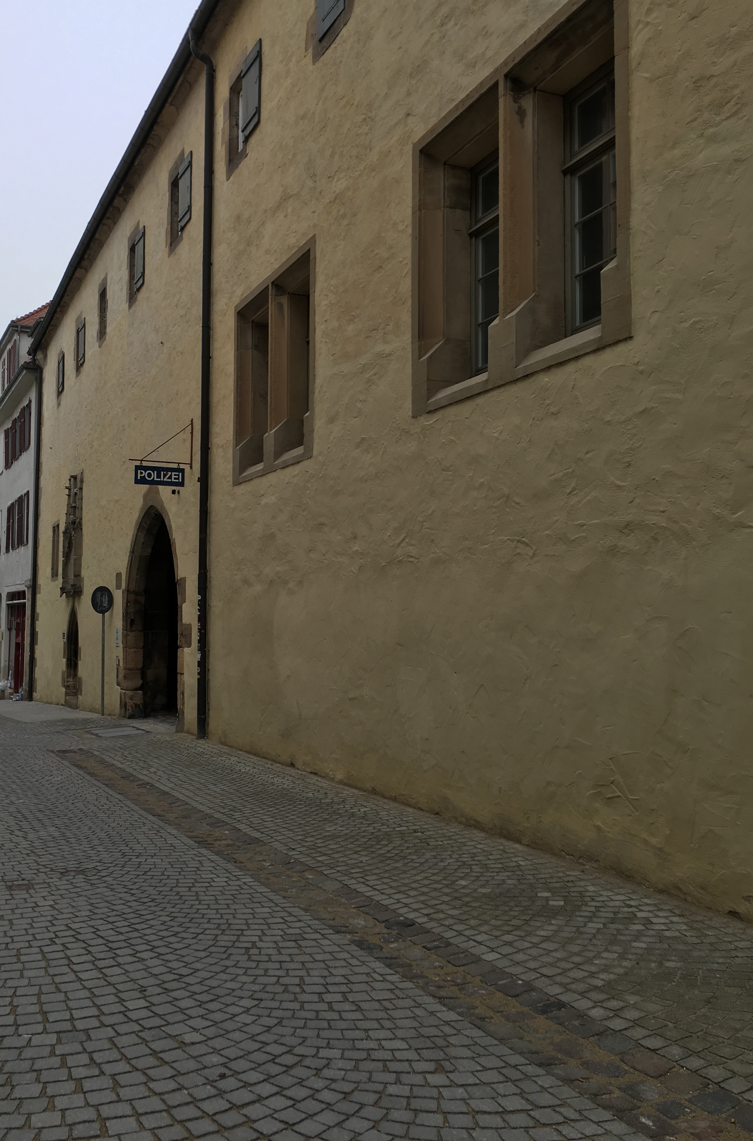 Der Bebenhäuser Pfleghof in Tübingen Ansicht richtung Lustnauer Tor